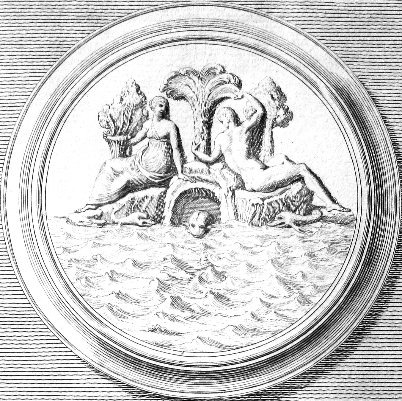 Gemme mit Darstellung einer bekleideten Frau und einem nackten Mann auf einem Eiland im Meer, die als Anregung für Danneckers Nymphengruppe gedient haben könnte.